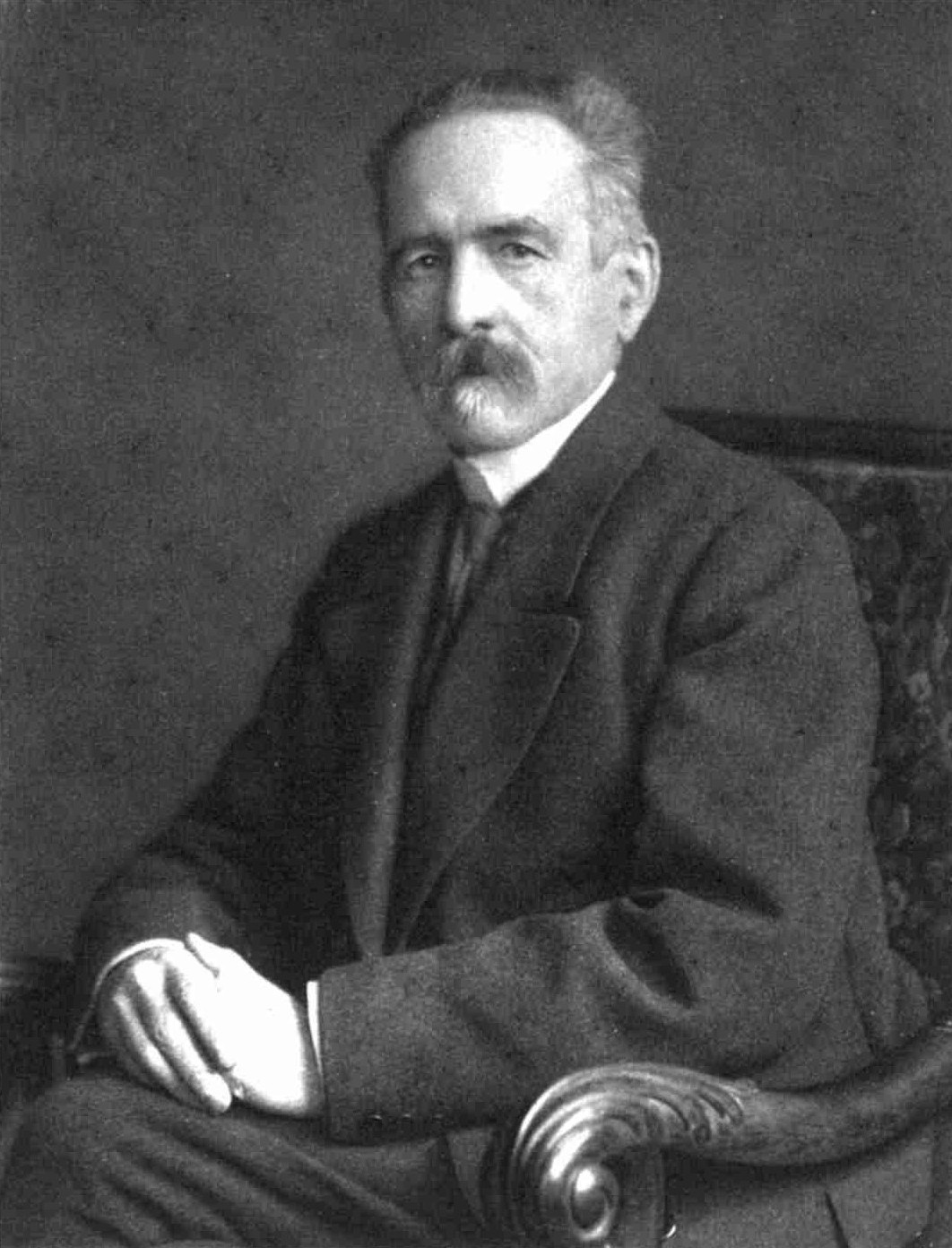 Ludwig Elster (1856–1935), deutscher Nationalökonom und Hochschulreferent. Foto von Alfred Bischoff